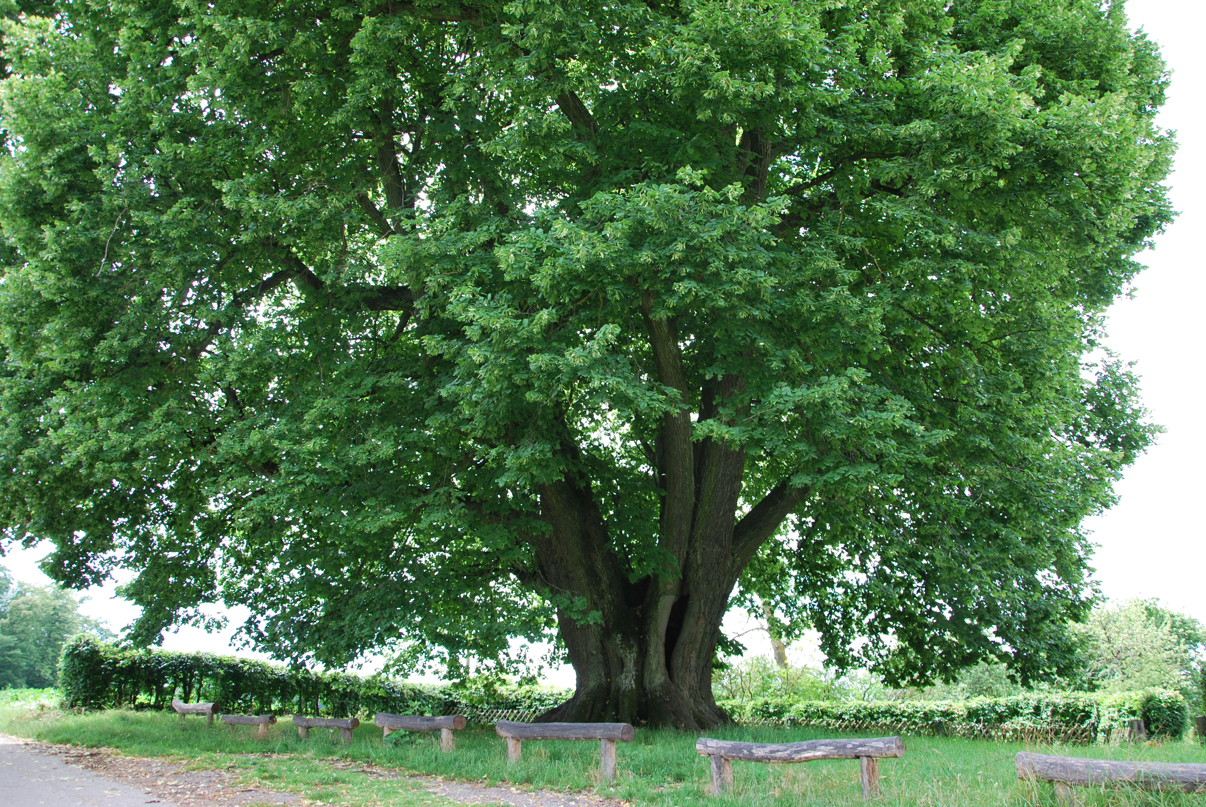 ca. 500 Jahre alte Linde bei der Wallfahrtskapelle Neusaß bei Schöntal